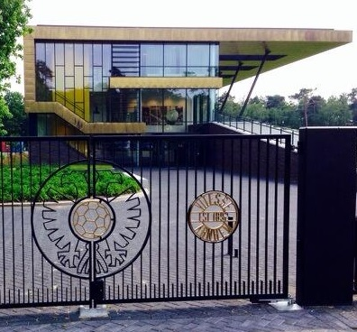 Home of Vitesse